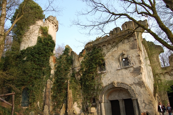 Das Spookslot in Efteling von außen